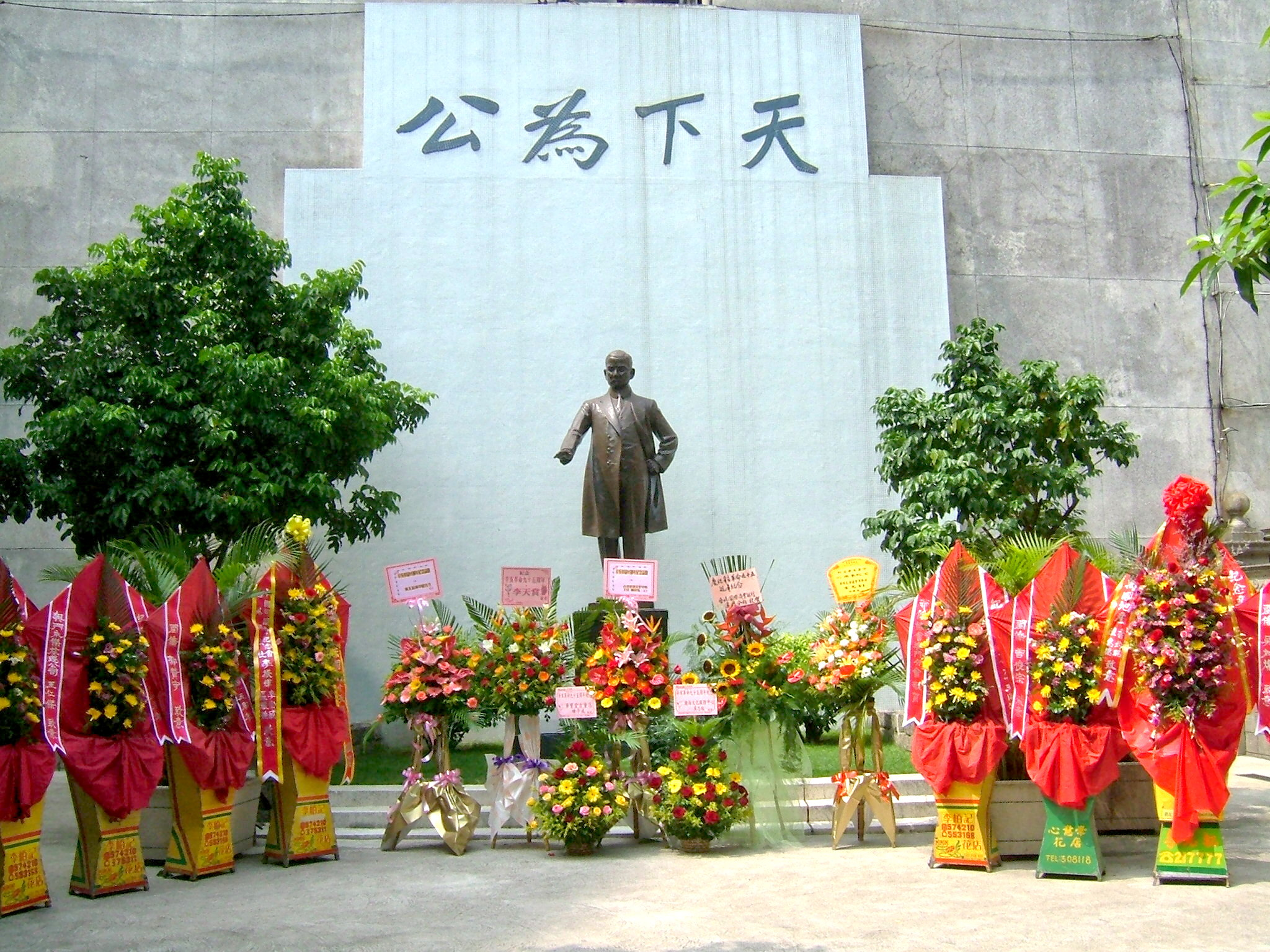 澳門國父紀念館孫中山銅像